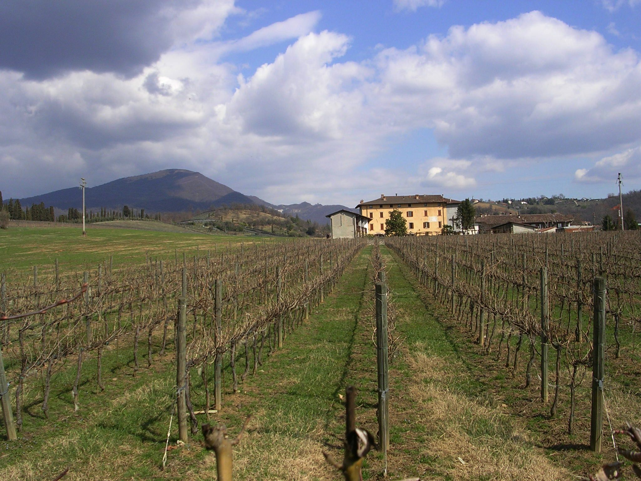 Cascina Tordela, Torre de' Roveri, Bergamo